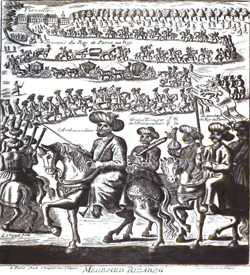 Fransa kralı XIV Lüdovikin sarayına göndərilən Səfəvi elçisi, İrəvan şəhər kələntəri Məhəmməd Rza bəy